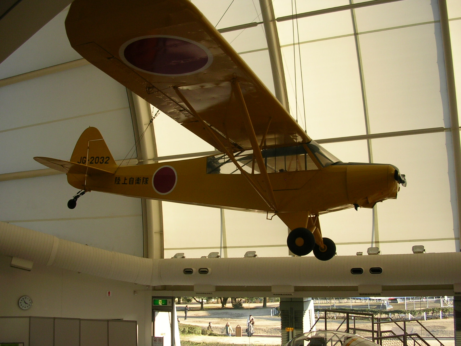 L-21 (PA-18 Piper Supercub)